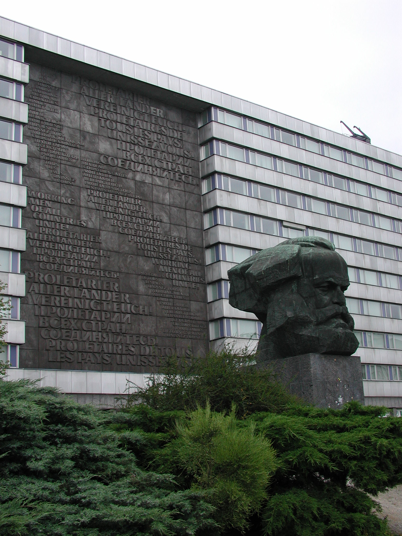 tadt Chemnitz, Karl-Marx-Monument mit gestalteter Metallwand dahinter